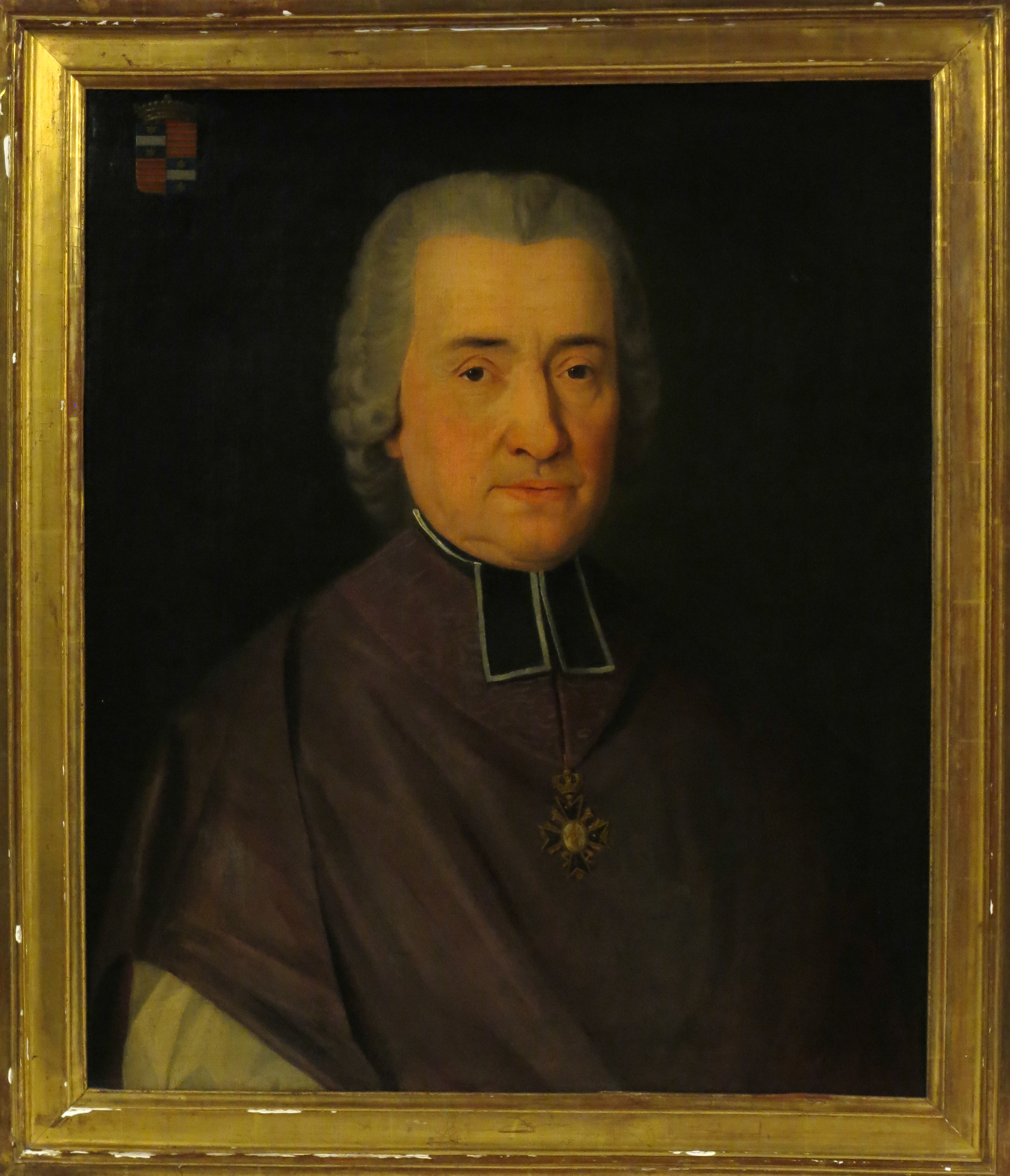 Portrait, huile sur toile, XVIIIème